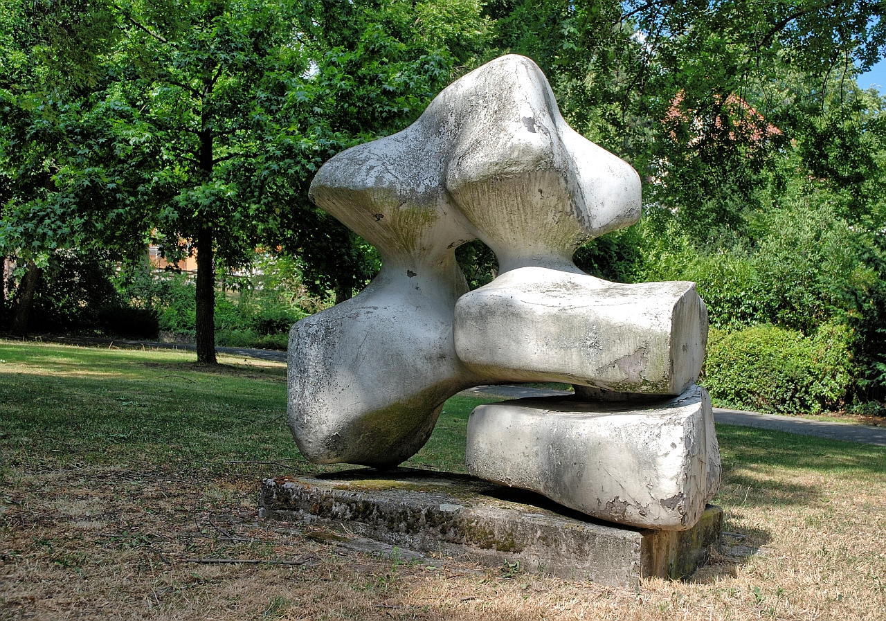 Helmut Brinckmann: Krönung (1981). Eigentum: Städtische Kunstsammlung Darmstadt. Standort: Mathildenhöhe Darmstadt, Parkanlage am Alexandraweg.